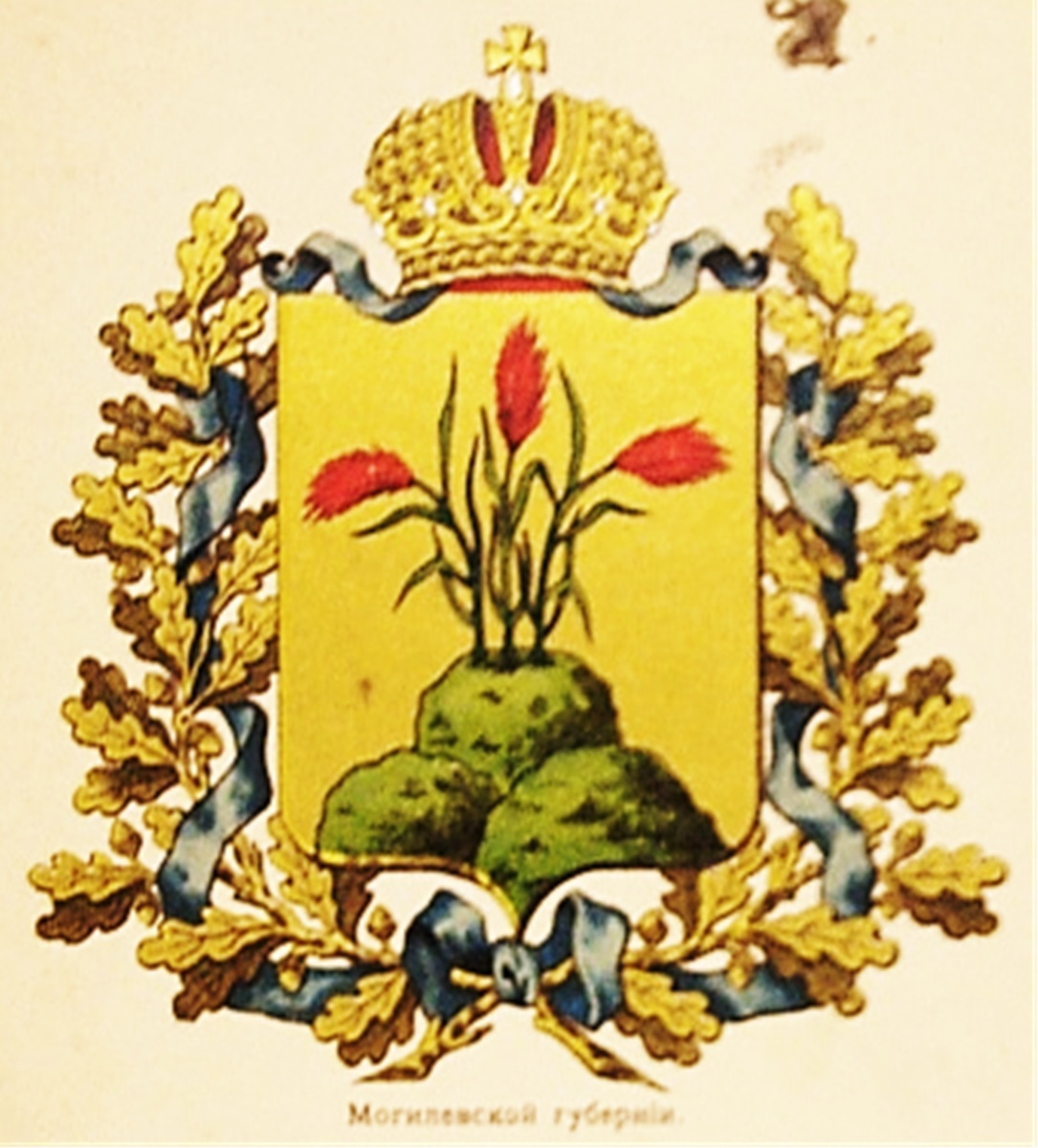 Official Russian Empire coat of arms Mogilev Governorate. Paper non-post card of Russian Empire. Герб Российской Империи Могилёвской губернии издания Сукачова, СПб. Непочтовая карточка Российской Империи.